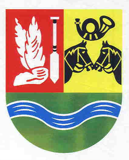 Wappen der Gemeinde Hademstorf